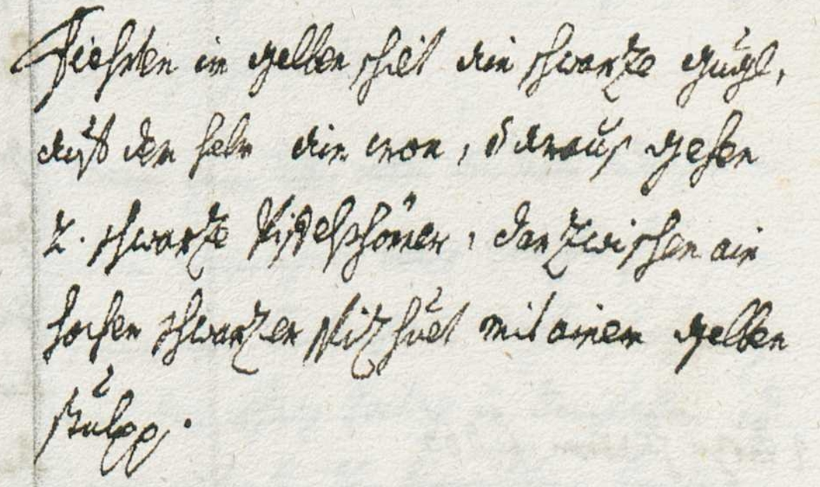 Beschreibung des Wappens der Jüngeren Gurren bei von Prey (1740; Band XXII, Seite 463r).